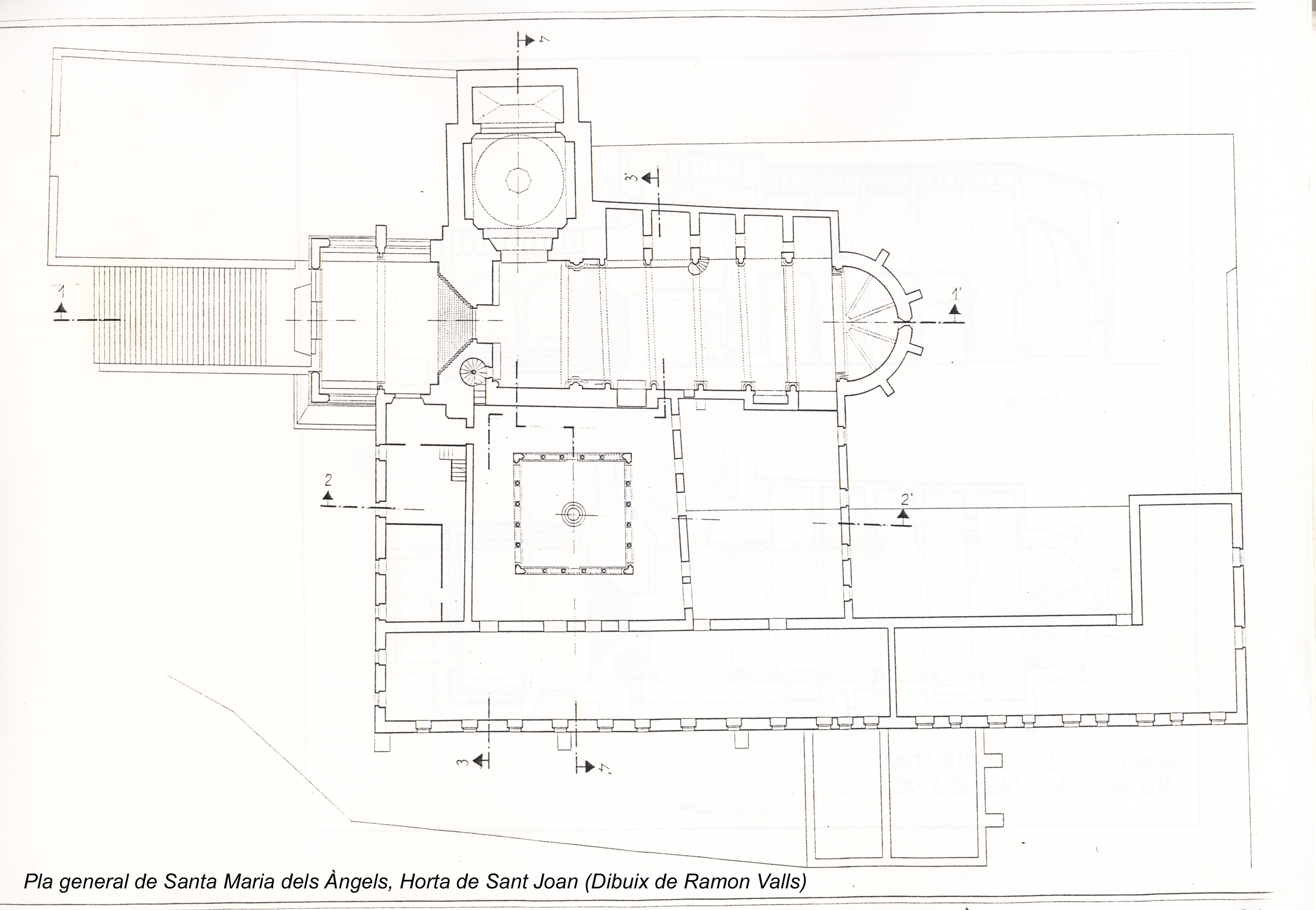 Planta general de Santa Maria dels Àngels. Horta de Sant Joan. Dibuix de Ramon Valls, arquitecte.